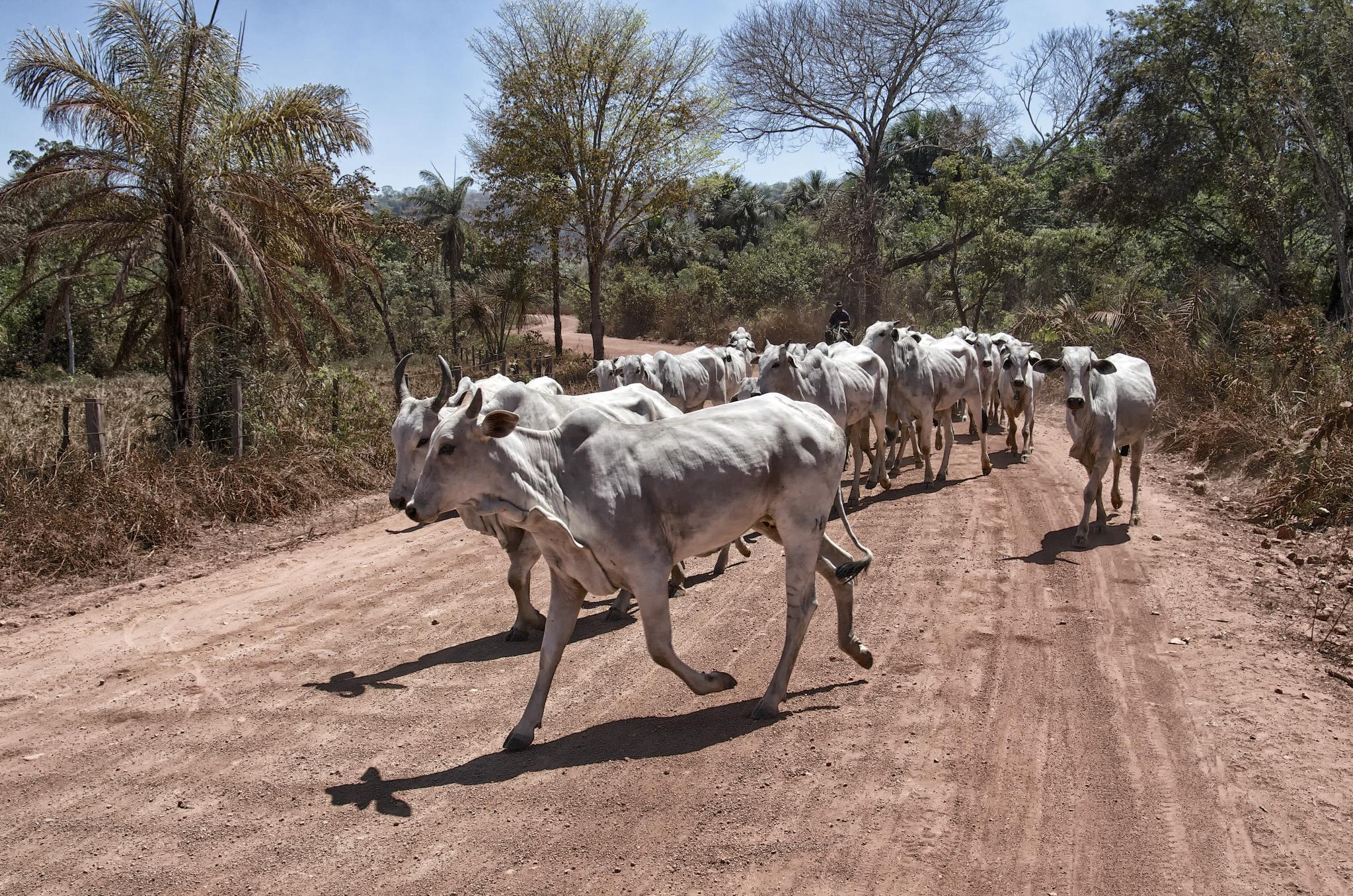 Do Gerais a Balsas